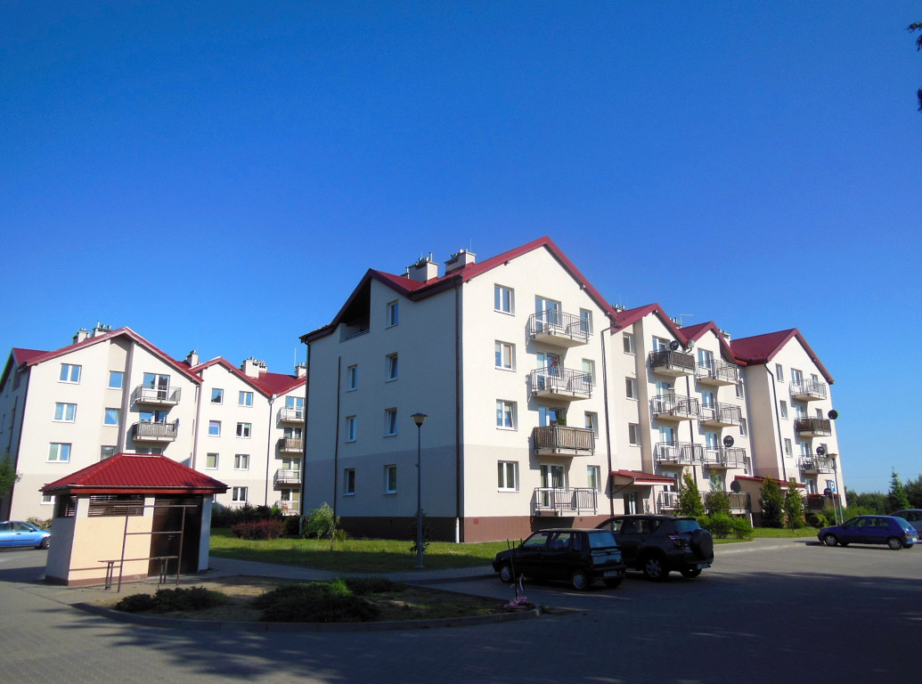 Osielsko k. Bydgoszczy, zabudowa